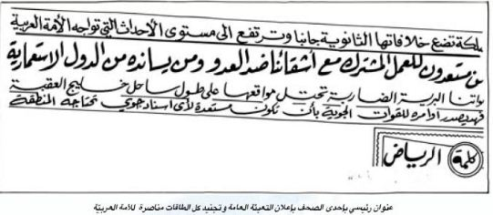 إعلان رئيسي بإحدى الصحف المحلية ببدء التعبئة العامة للقوات السعودية قبل حرب العربية الإسرائيلية عام 1967 .